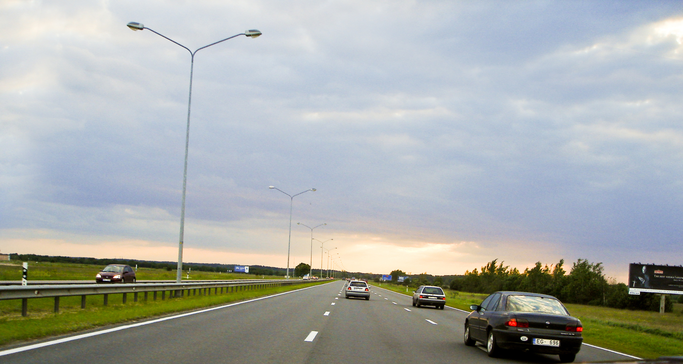 soseja